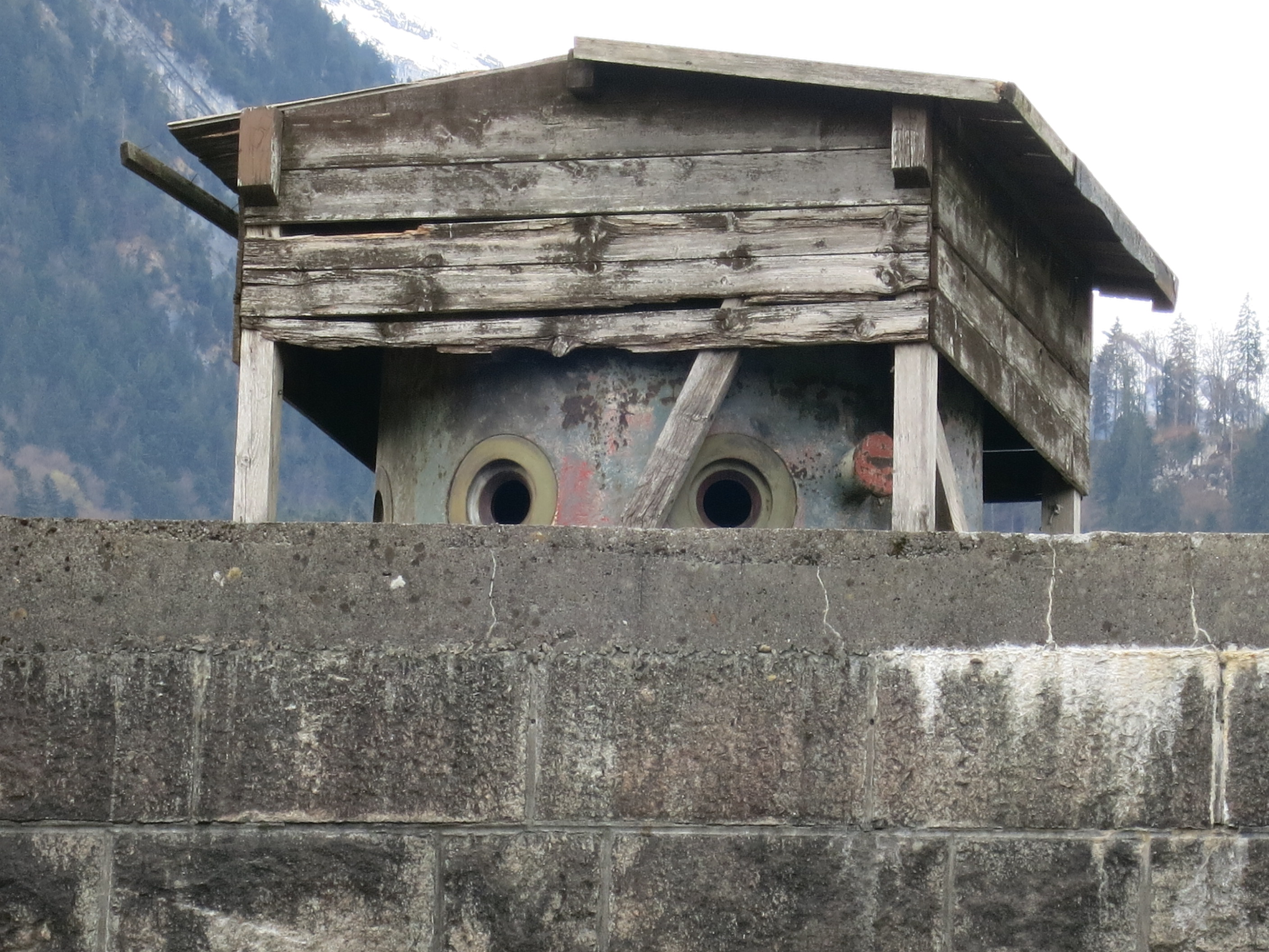 Sperrstelle Näfels GL, Schweiz